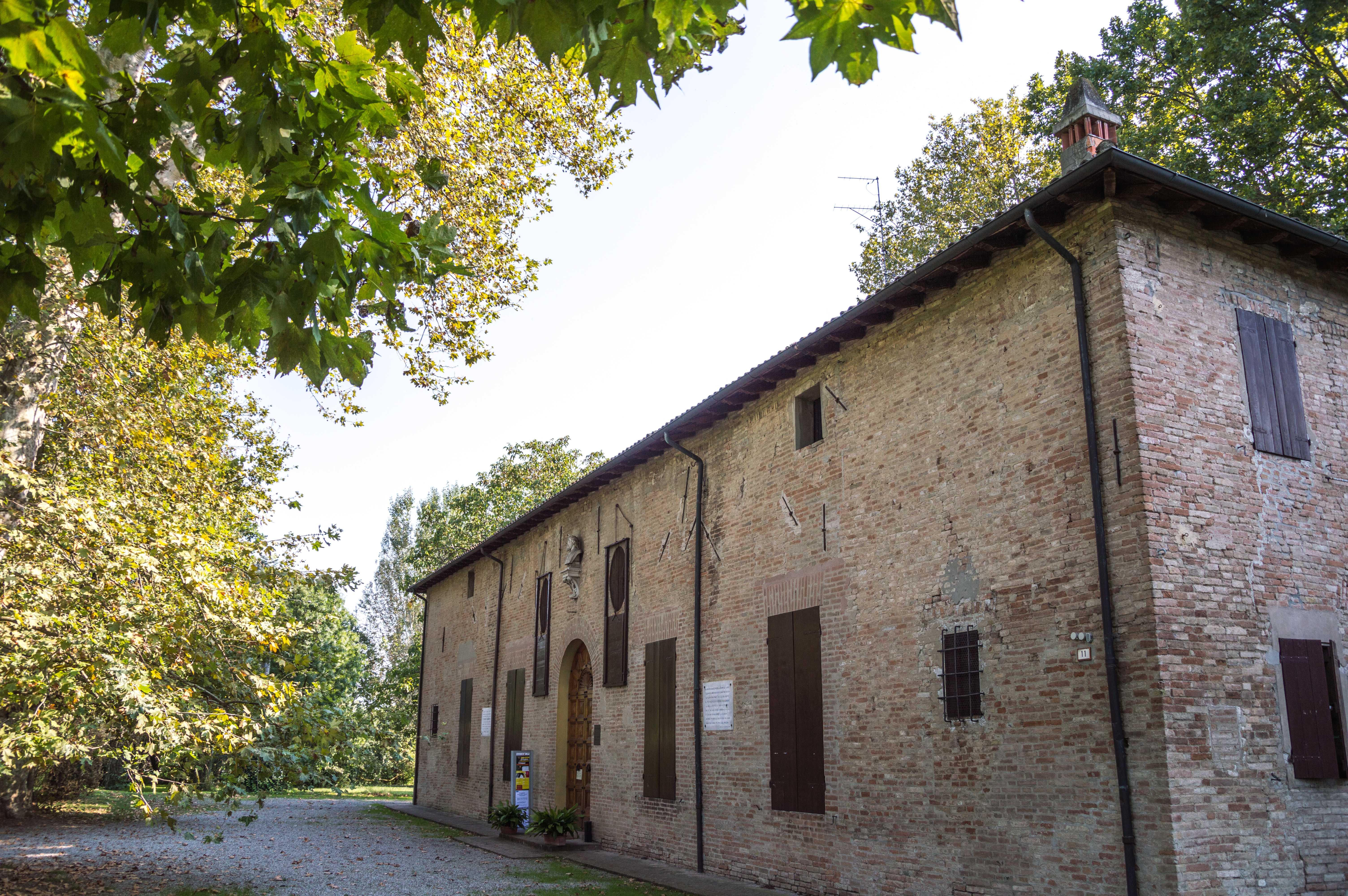 Il Mauriziano This is a photo of a monument which is part of cultural heritage of Italy.